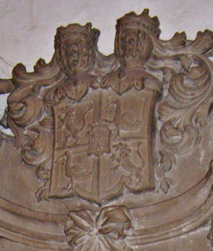 Wappen der kurpfälzischen Adelsfamilie der Freiherrn von Hegele, vom Epitaph eines Angehörigen in der Heiliggeistkirche Heidelberg